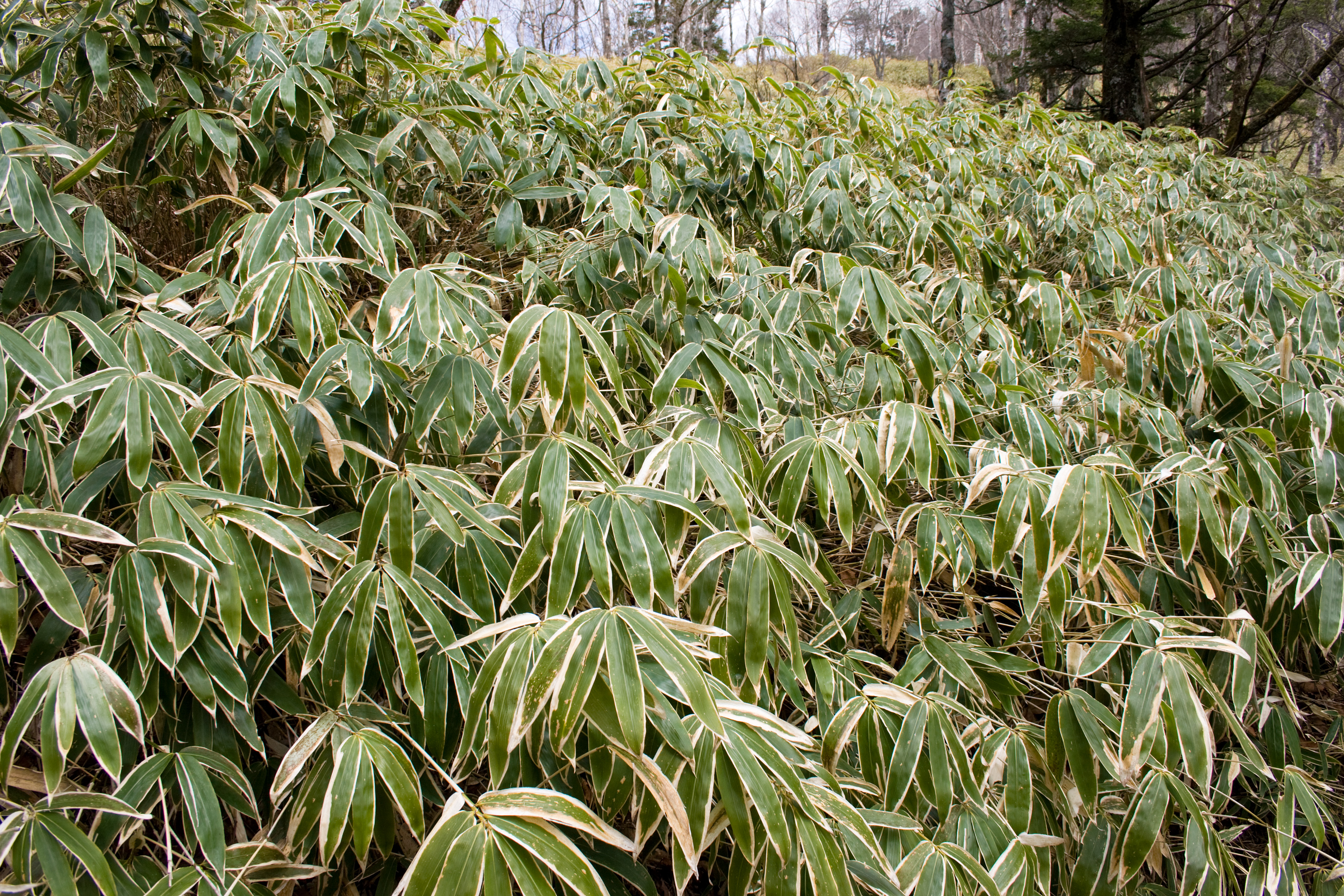 クマザサの一種